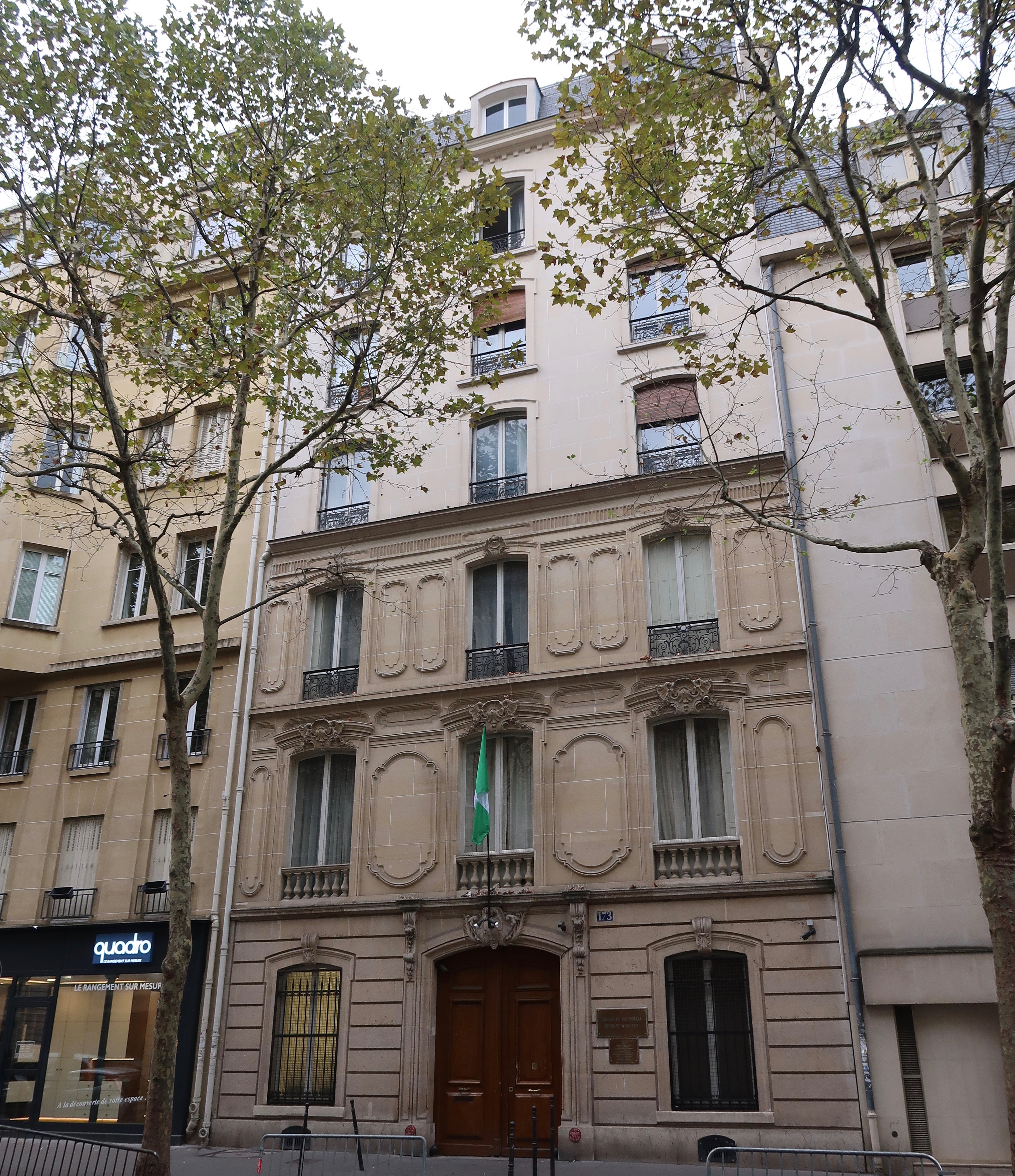 Ambassade du Nigeria en France, 173 avenue Victor-Hugo (Paris 16e).